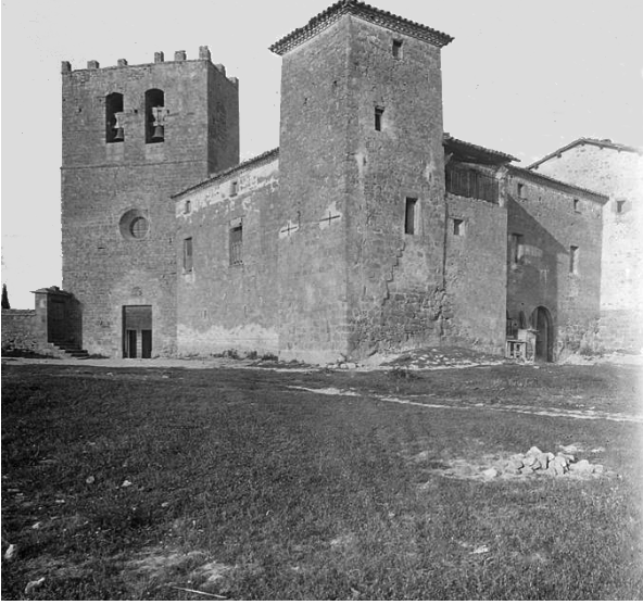 Antiga abadia benedictina (Santa Maria de Serrateix) , situada al sector occidental del poble de Serrateix (Berguedà) .